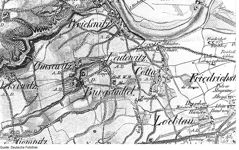 Original image description from the Deutsche Fotothek Dresden-Leutewitz. Ausschnitt aus: Oberreit, Sect. Dresden, 1821/22